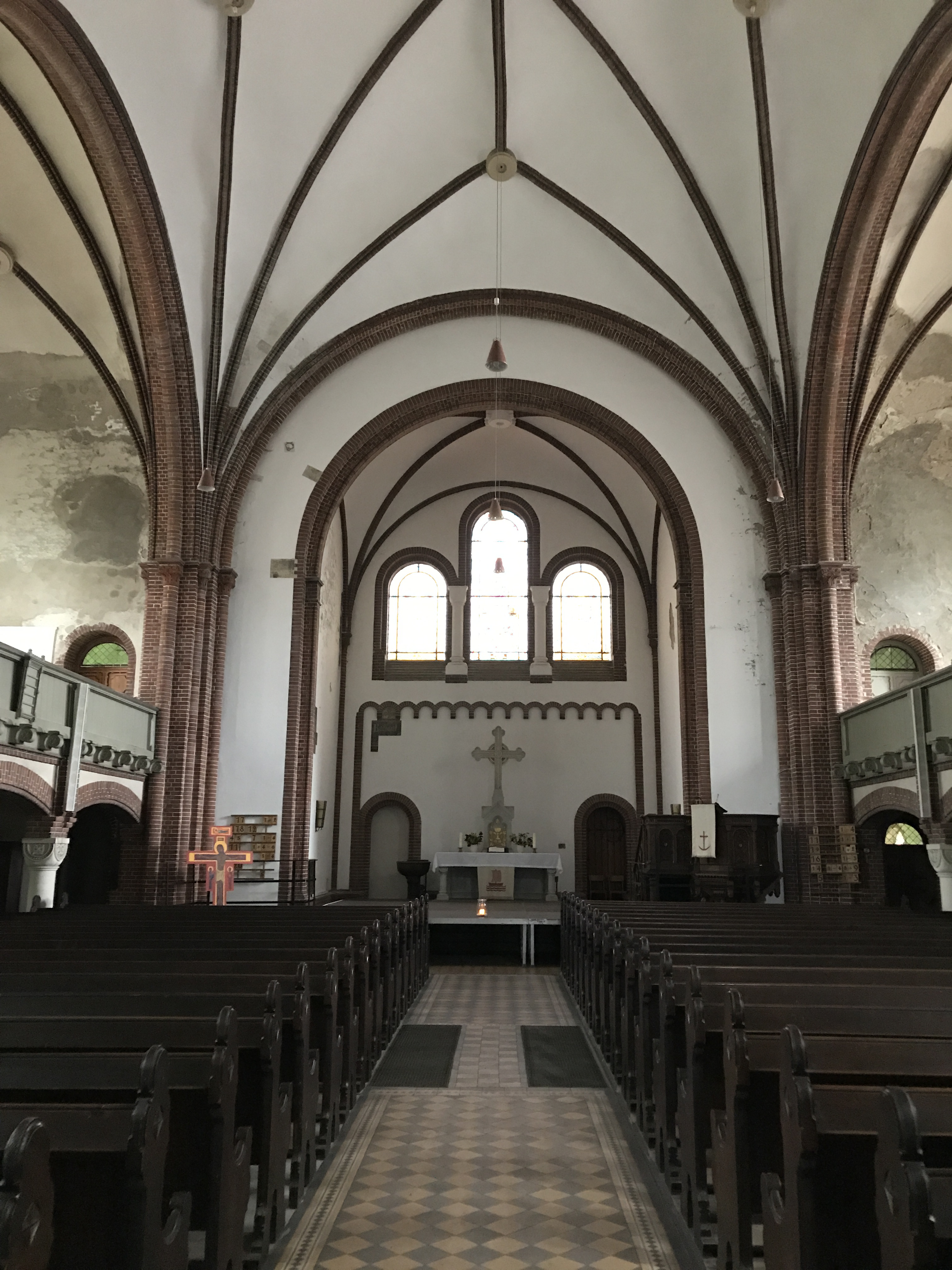 Die evangelische Kirche Sankt Jakobi ist eine neogotische Kirche in Luckenwalde.